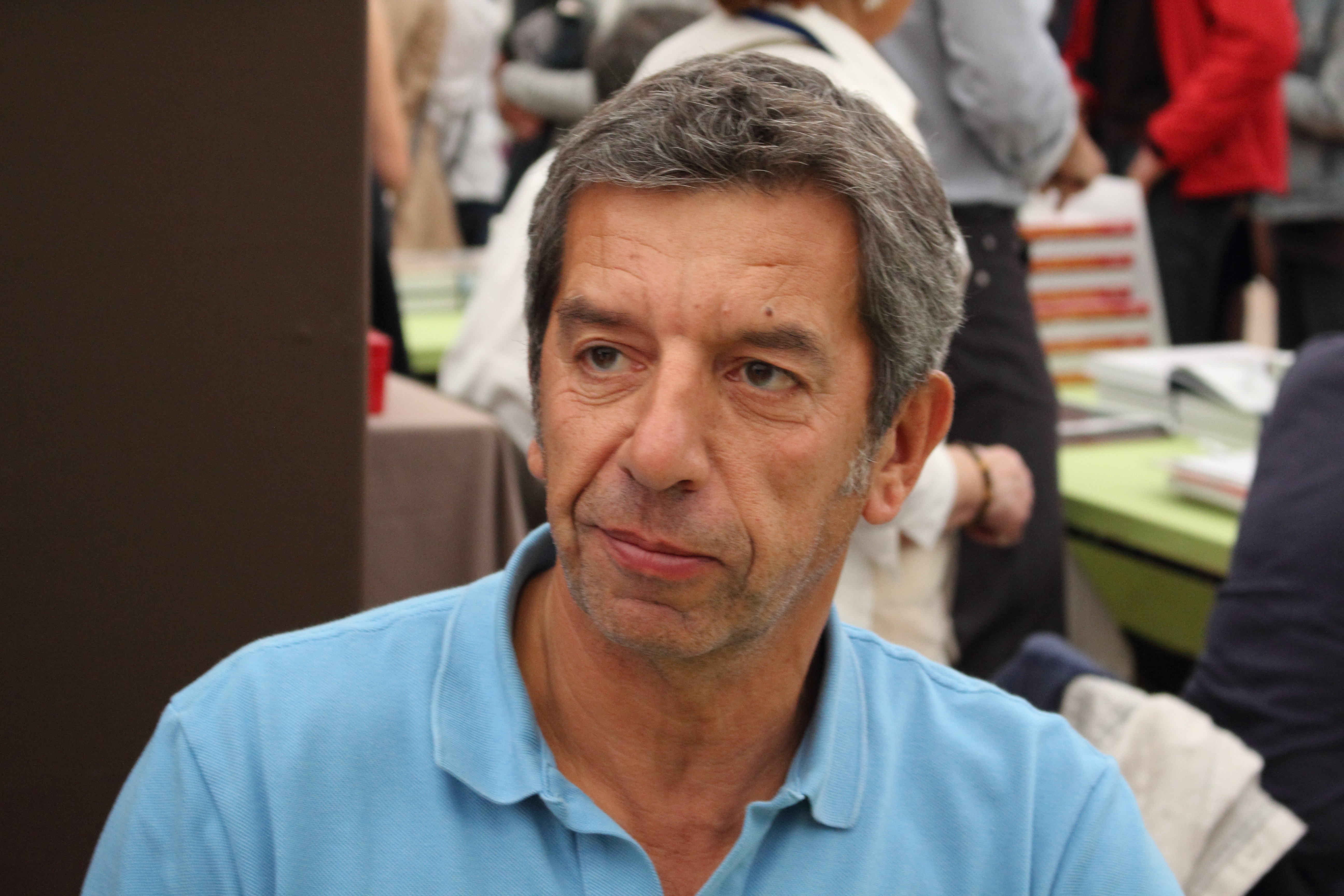 Michel Cymes - Le Livre sur la Place